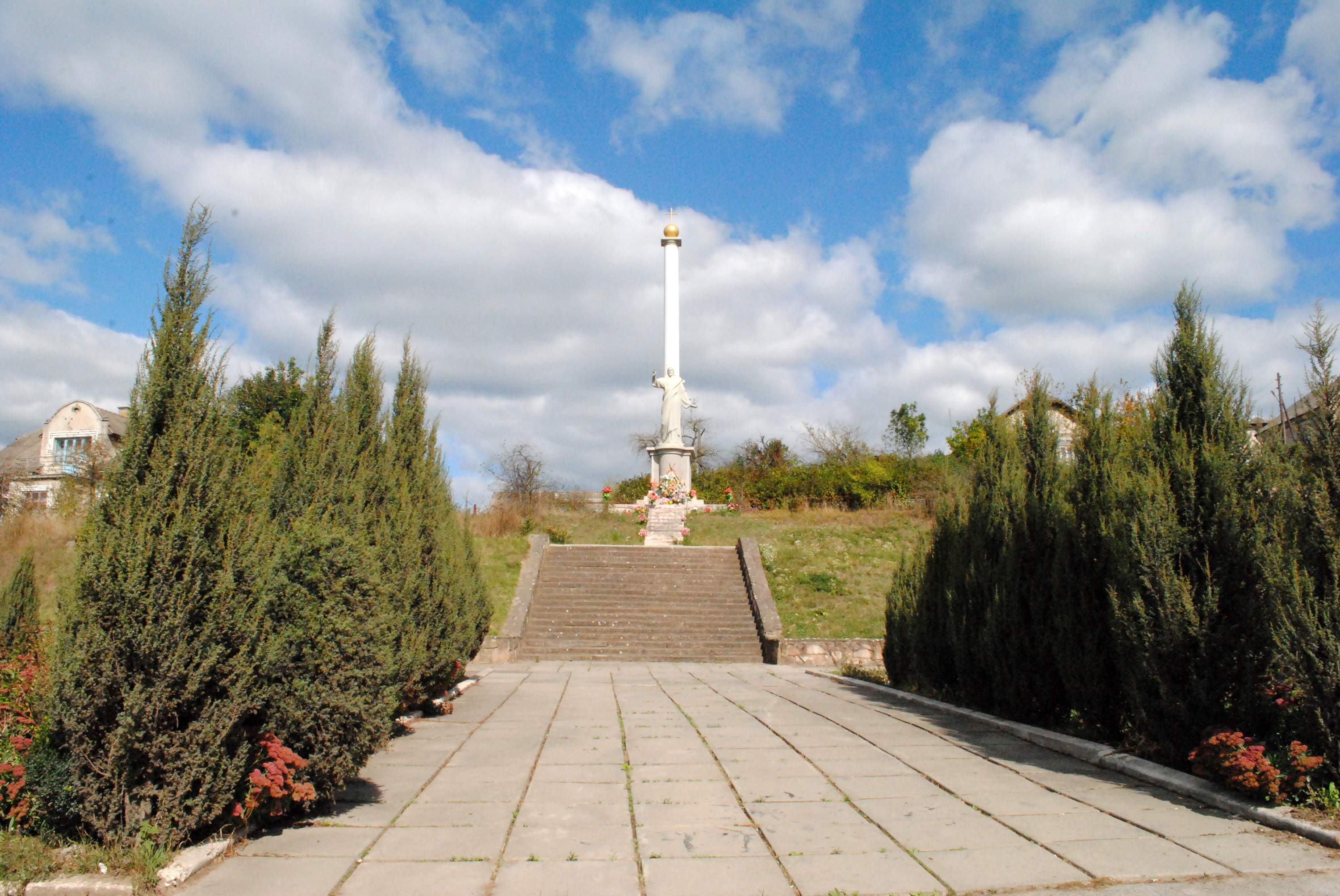 Монумент Христові-Спасителю (Бучач) в Бучачі Тернопільської області на роздоріжжі вулиць генерала Шухевича і Грушевського, т. зв. Чортківському роздоріжжі. Автор — Роман Вільгушинський.